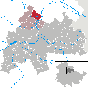 Kannawurf in Thuringia - District Sömmerda